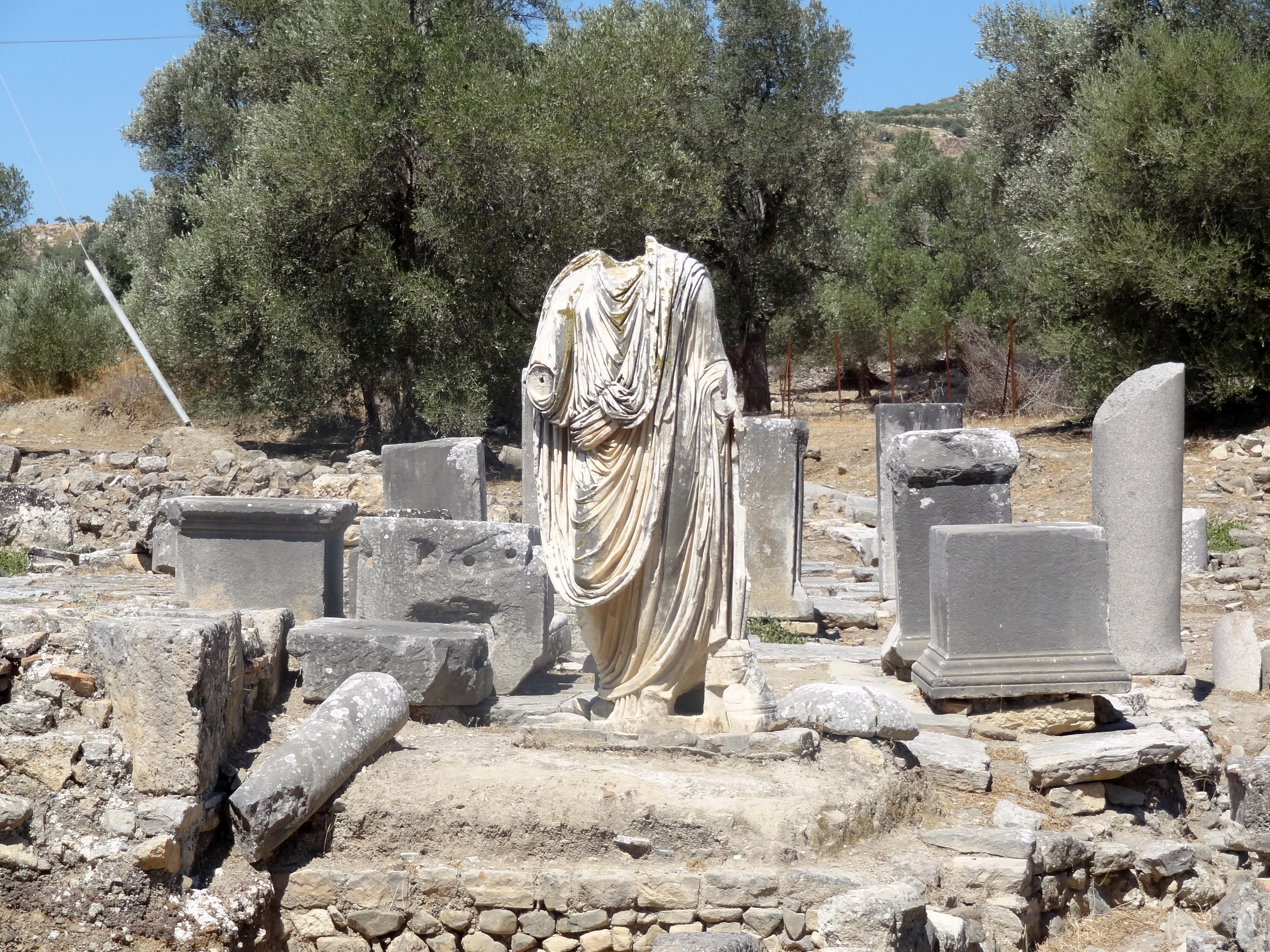 Reste der griechisch-römischen Stadt Gortyn (Γορτύν), Gemeinde Gortyna, Regionalbezirk Iraklio, Kreta, Griechenland